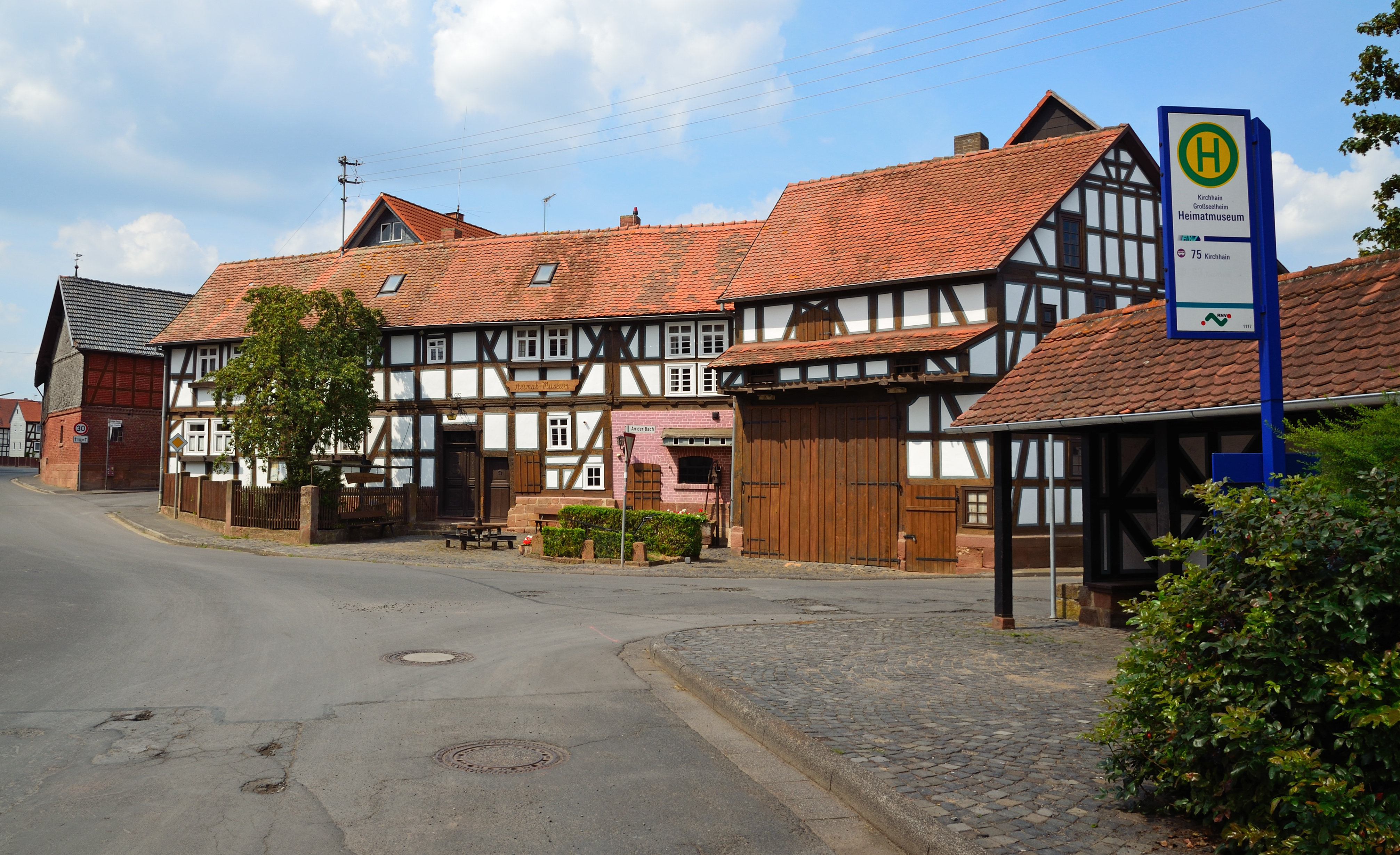 Der Brunetsche Hof in Großseelheim (Heimatmuseum, Marburger Ring 31, 35274 Kirchhain)